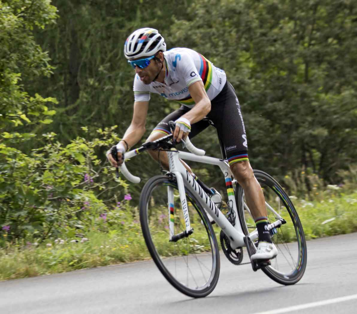 ALP10099 valverde